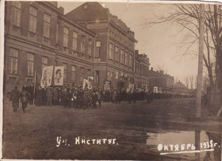 Беларуская (тарашкевіца): Рагачоў (Rahačoŭ), вуліца Ёлшынская (vulica Jołšynskaja). Рэальная вучэльня